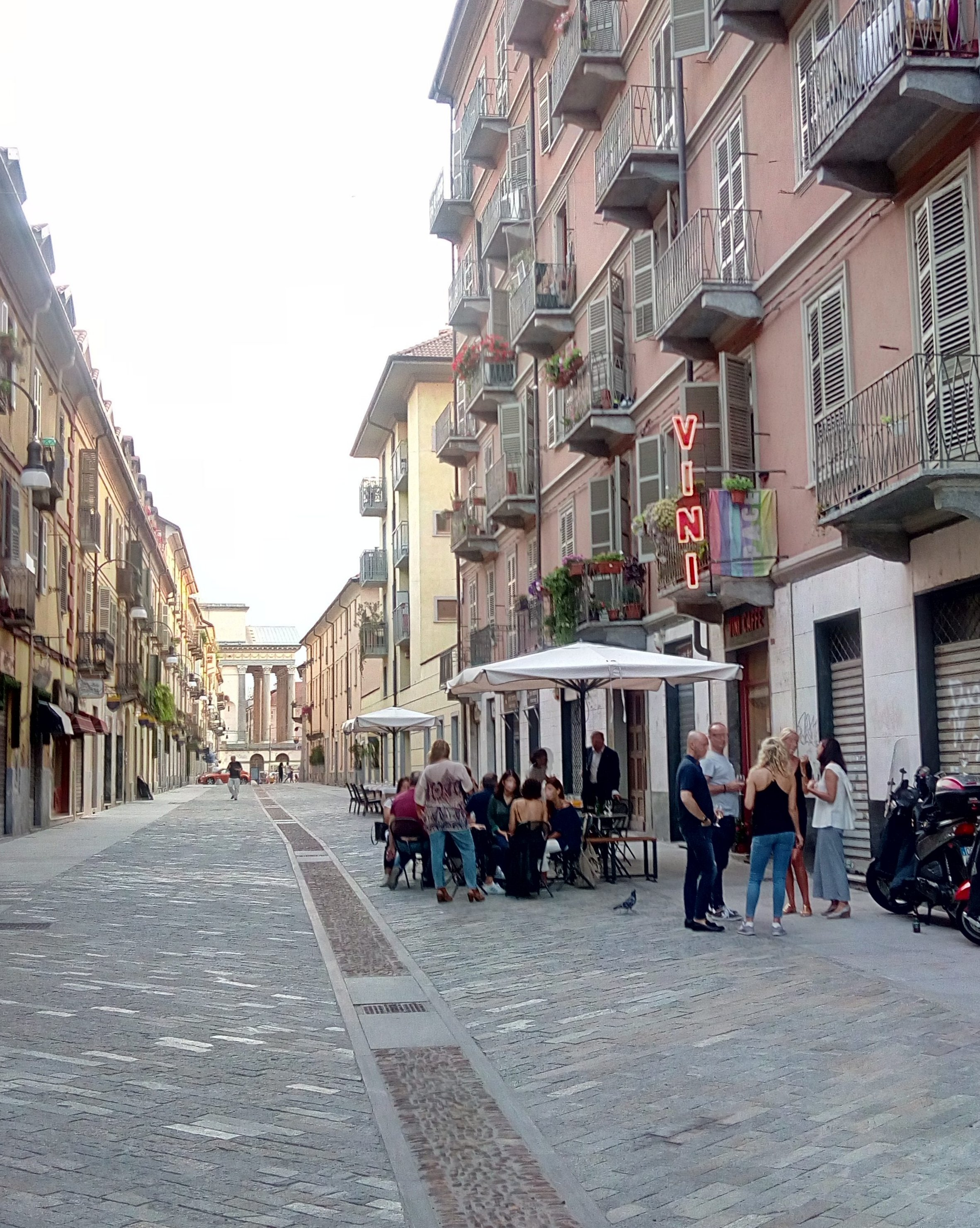 Via Monferrato dopo la pedonalizzazione, al crepuscolo.